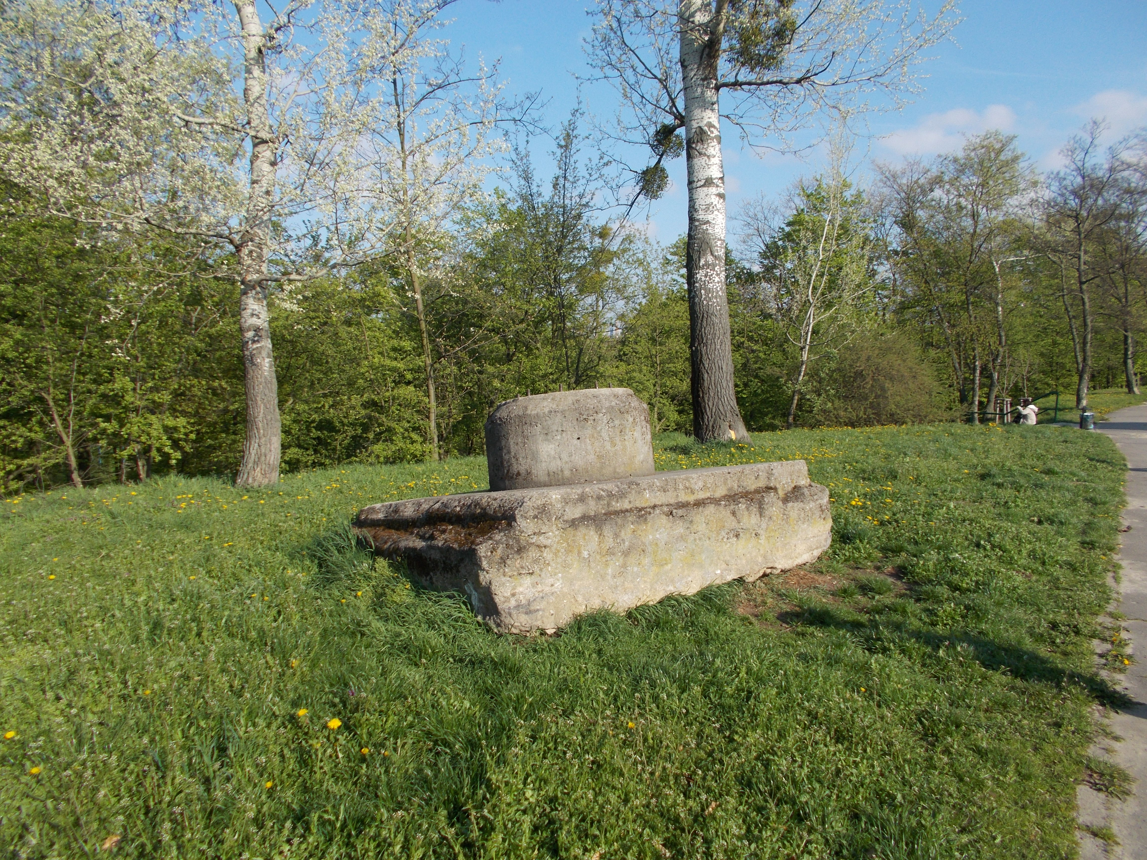 Osiedle Piastowskie w Poznaniu. Fundament po stanowisku obrony przeciwlotniczej z czasów II Wojny Światowej.